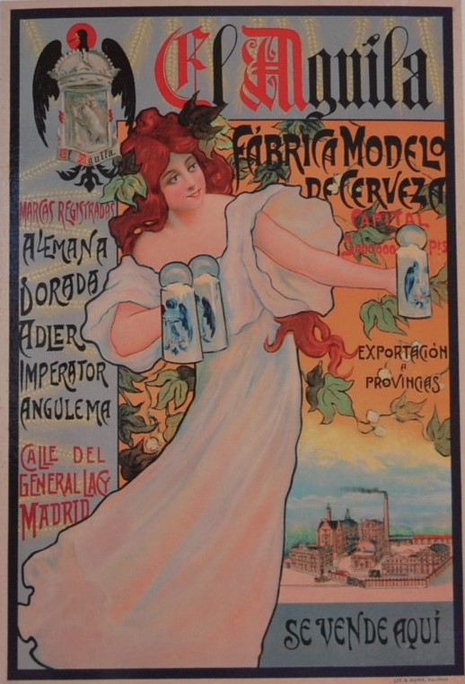 Cartel modernista de la empresa cervecera El Águila, radicada en Madrid (España). Fue realizado por Rafael Yzquierdo Vivas en el año 1910.